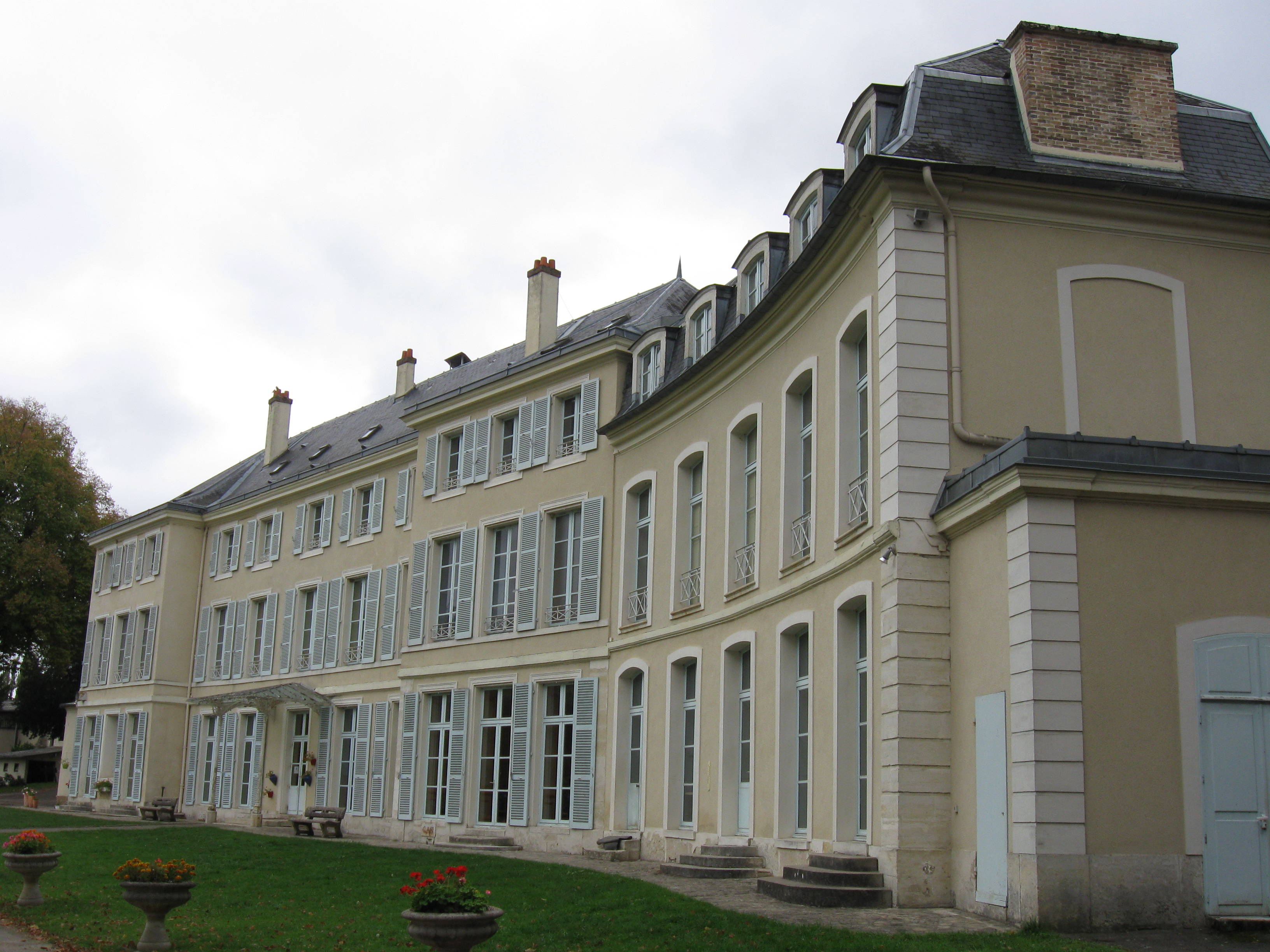 Château de Neauphle-le-Vieux. (Yvelines, région Île-de-France).